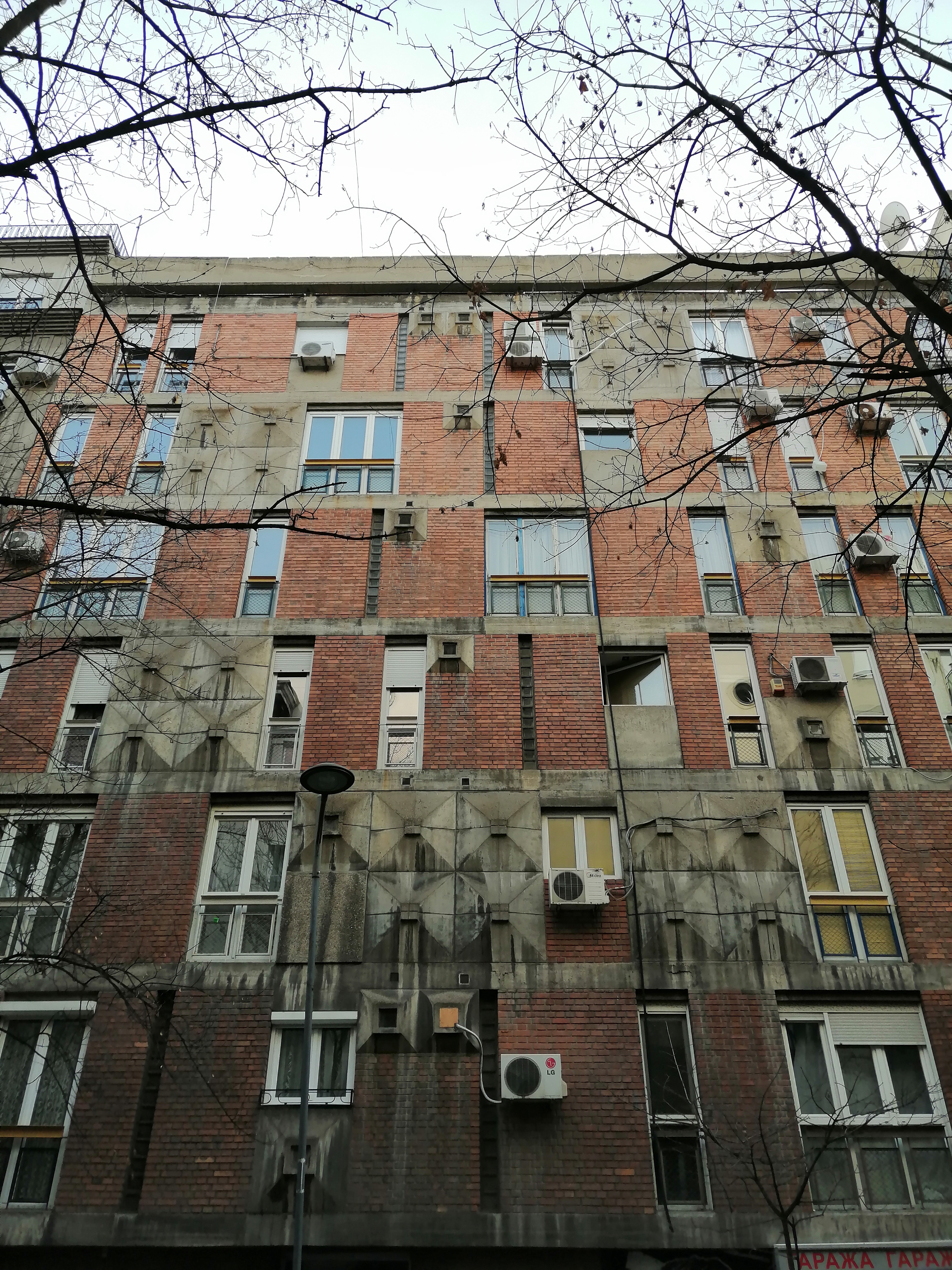 Srpski (latinica): Zgrada u ulici Braće Jugovića 14